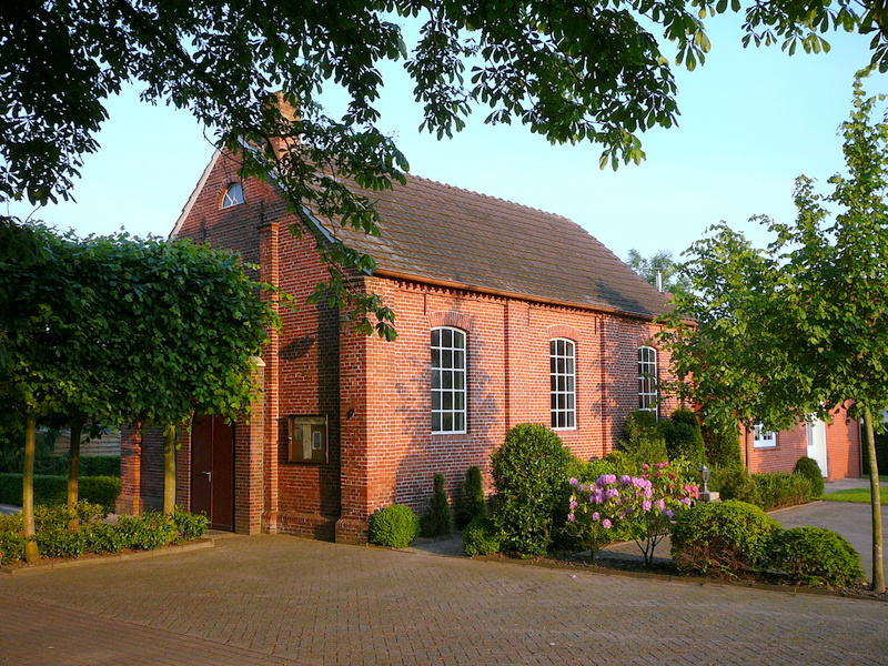 Altreformierte Kirche, Neermoor, Ostfriesland